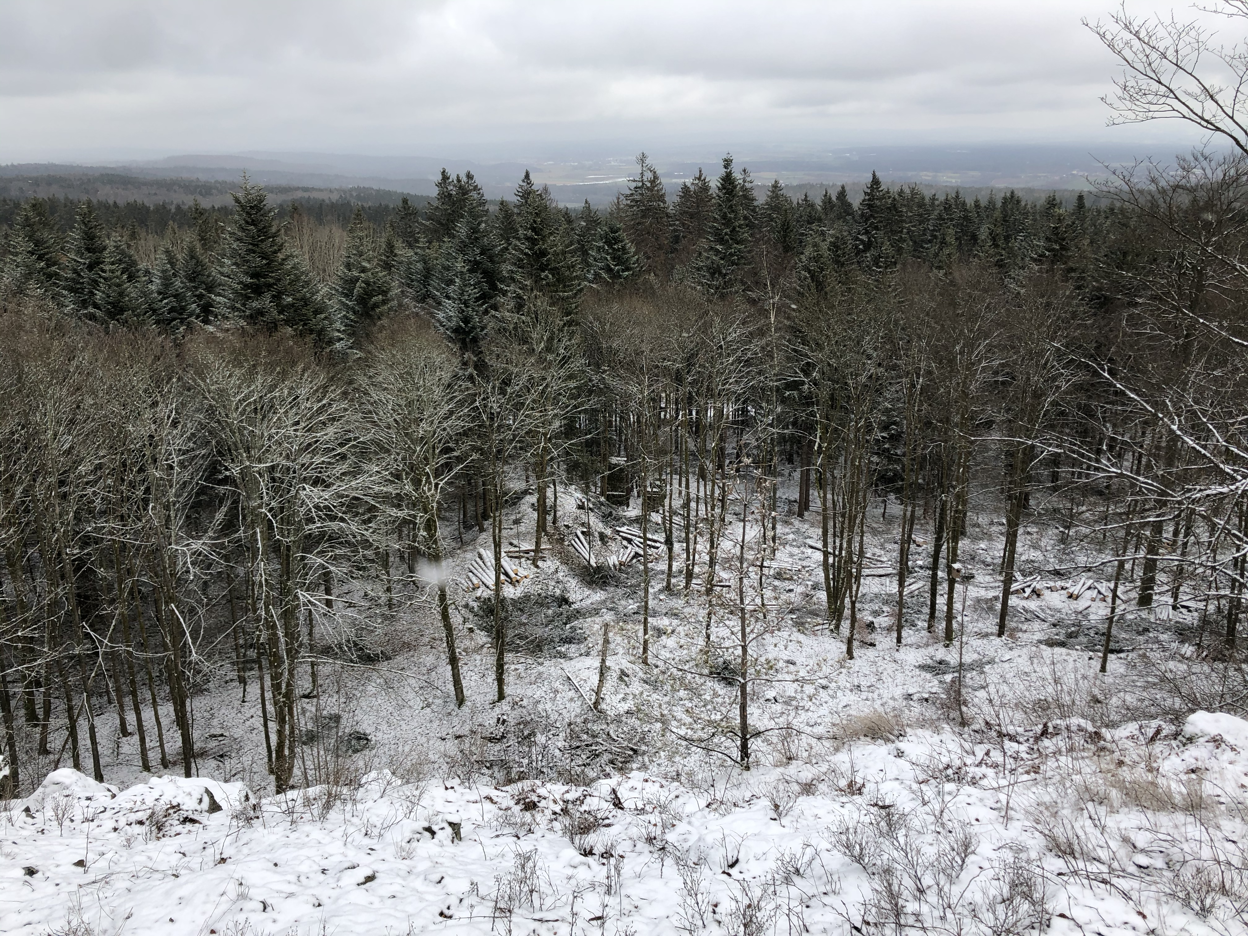 Blick vom Plößberg Richtung Osten, Wiesau in der Ferne erkennbar